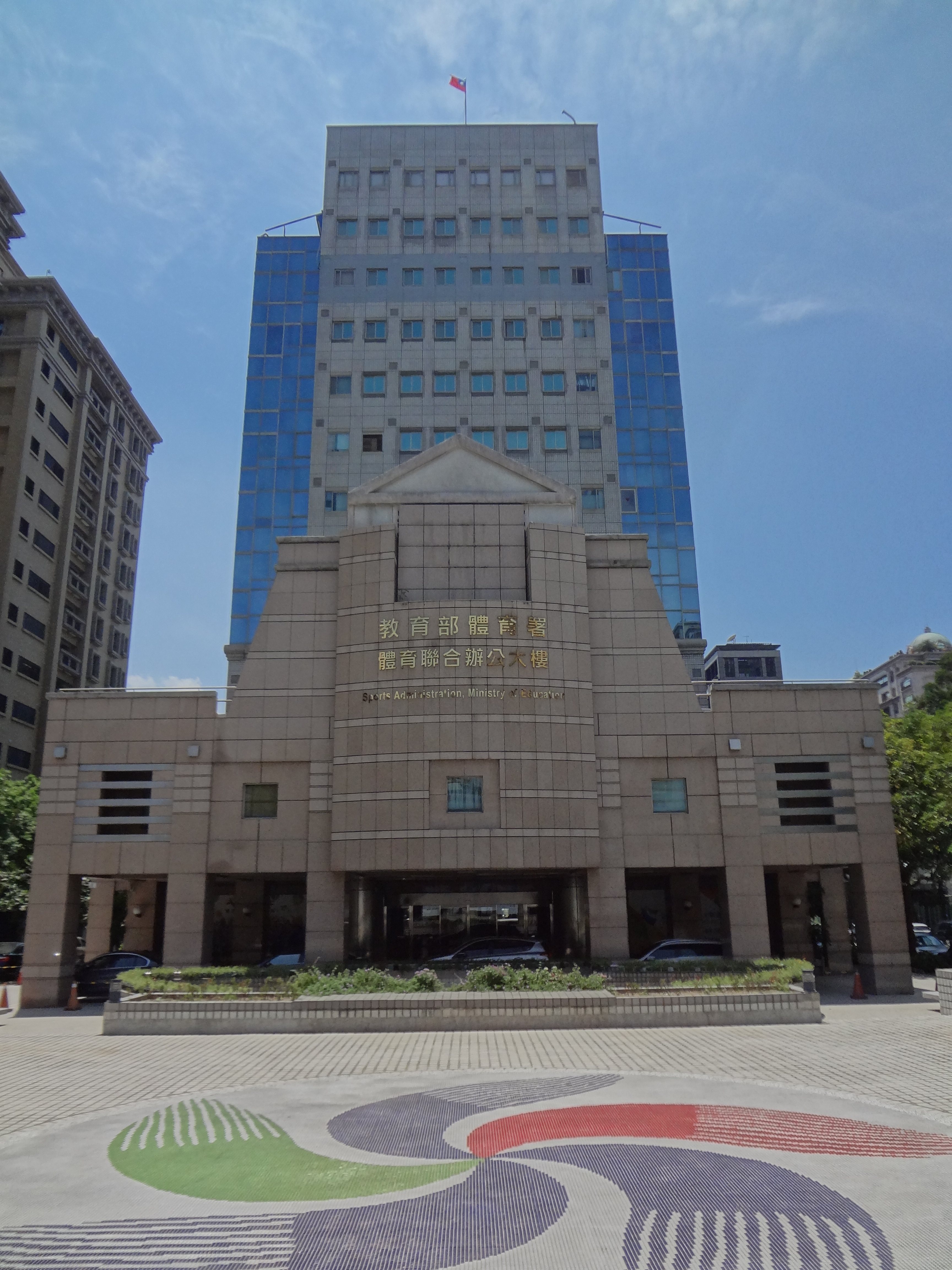 中華民國教育部體育署體育聯合辦公大樓，1993年竣工，位於臺北市中山區朱崙街20號，前方廣場圖案為行政院體育委員會會徽。